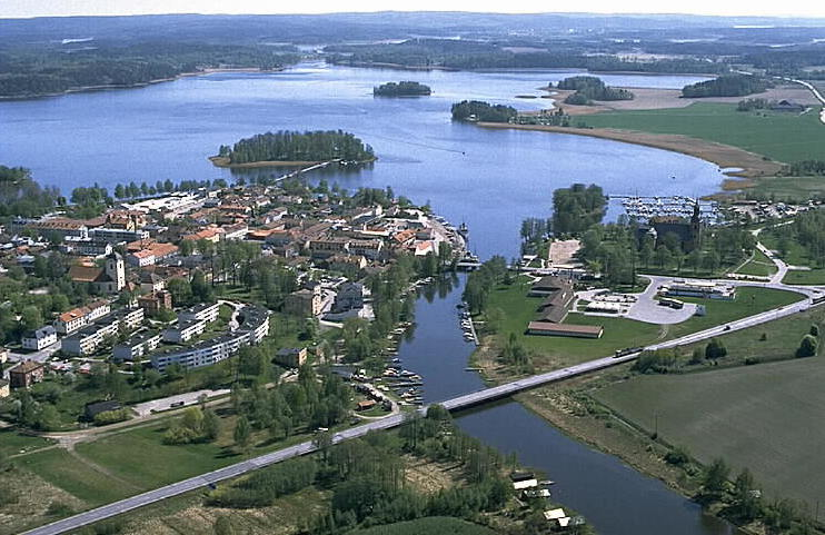 Motiv: Askersund Nyckelord: Flygbilder, Riksintressen Kategori: StadsmiljöAskersund